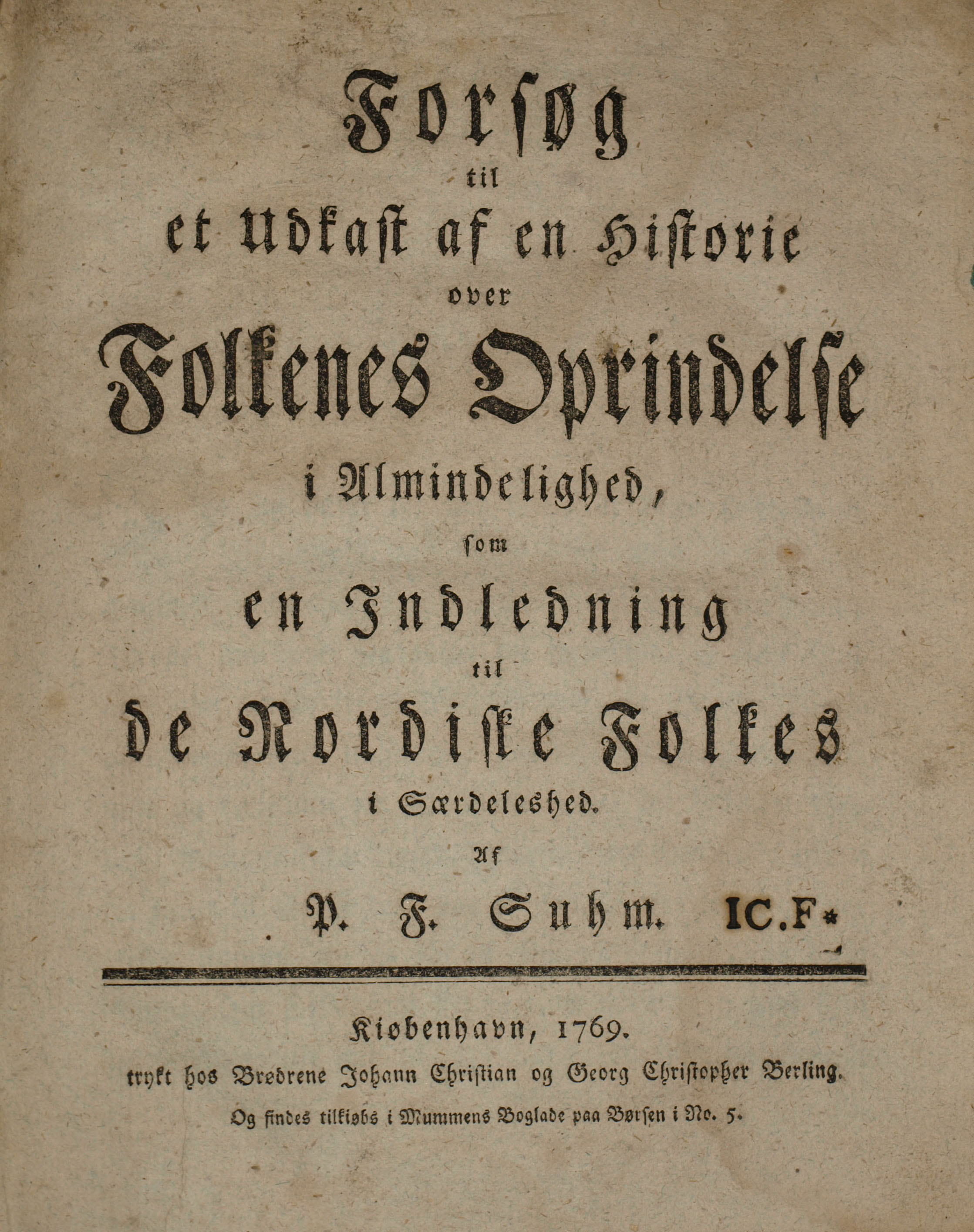 Titelbladet til Peter Frederik Suhms Forsøg til et udkast af en historie over folkenes oprindelse i almindelighed som en indledning til de nordiske folkes i særdeleshed fra 1769.